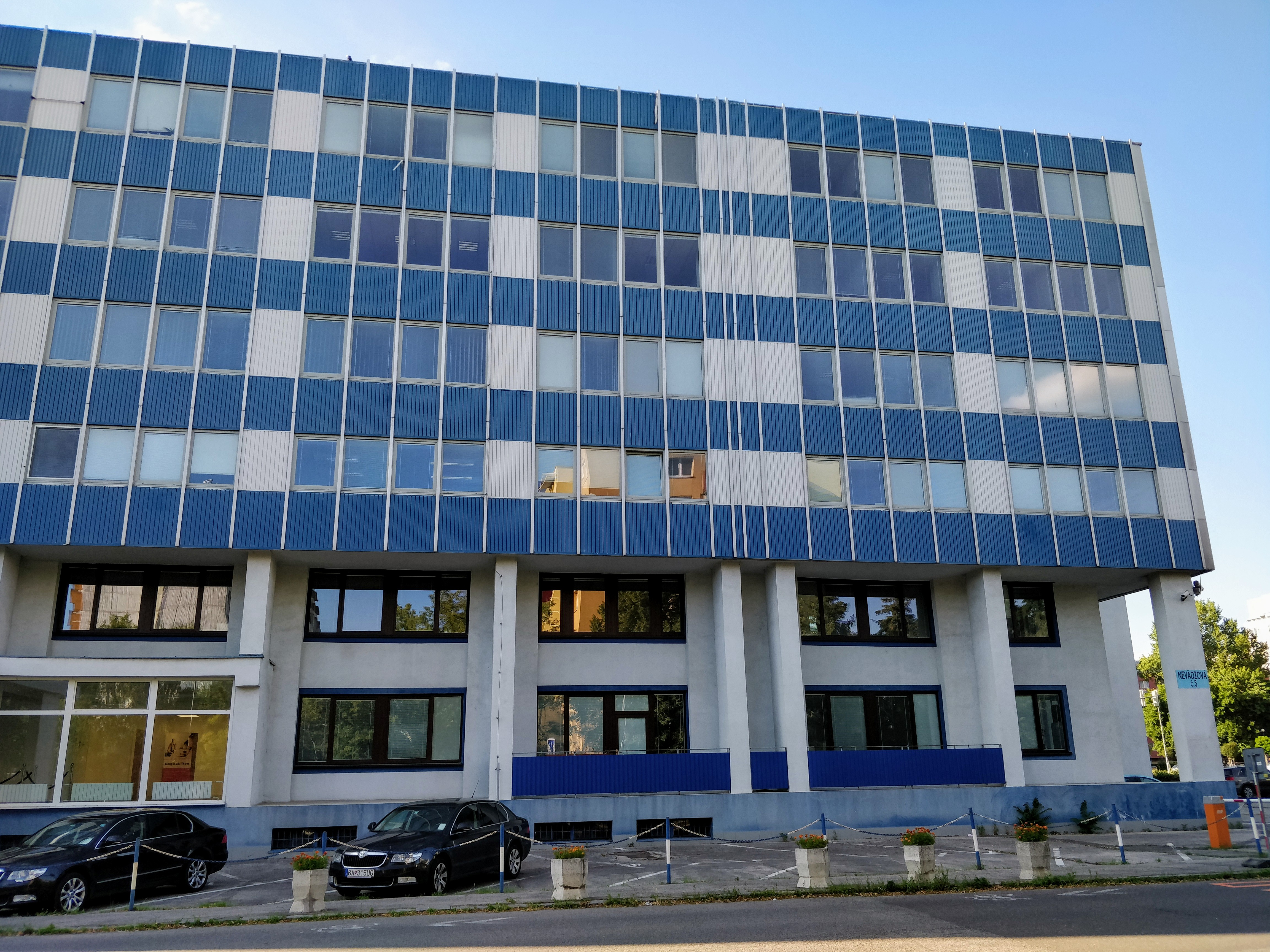 Nevädzová 5, Bratislava, Slovakia